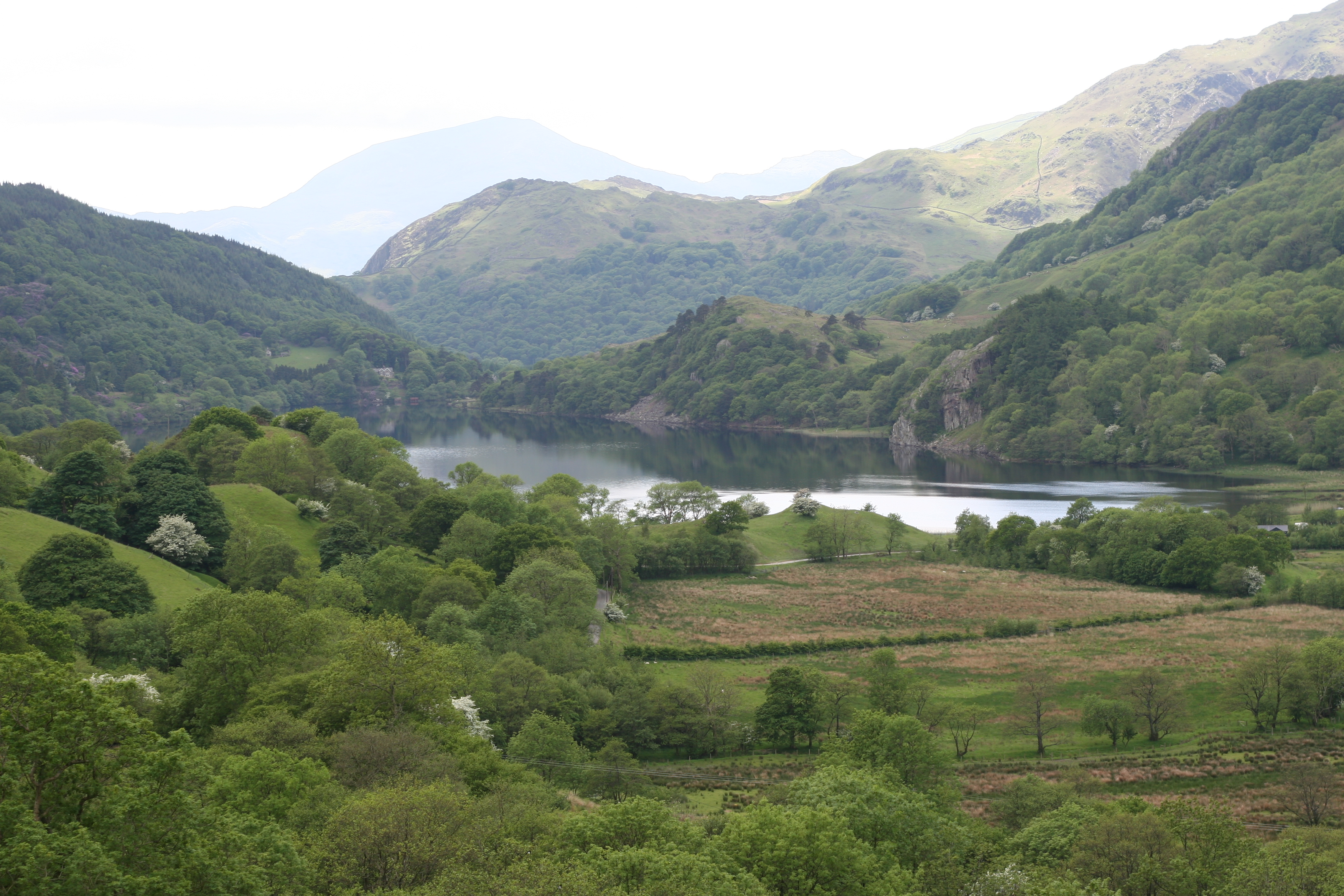 Llyn Gwynant, Gwynedd 09/06/2006 Rhion Pritchard : own work